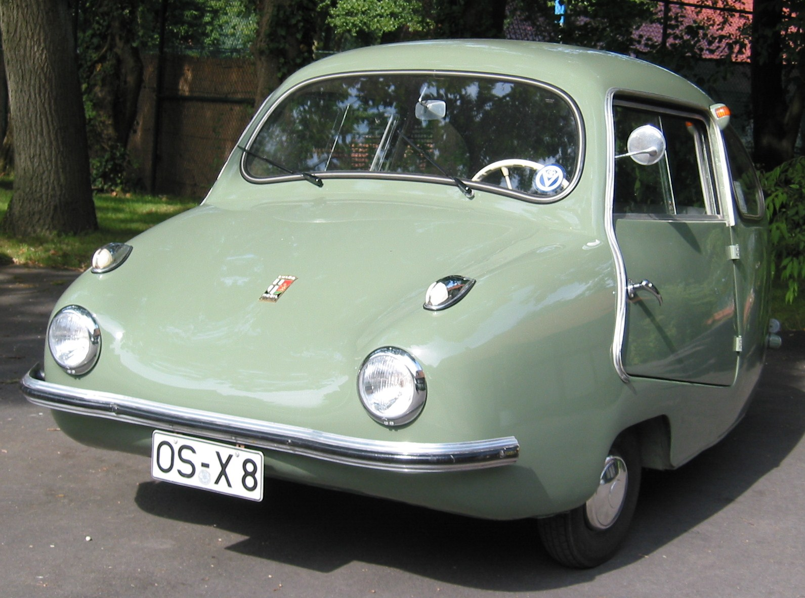 Fuldamobil NWF 200 1954, beschrieben in Oldtimer Praxis 11/1993